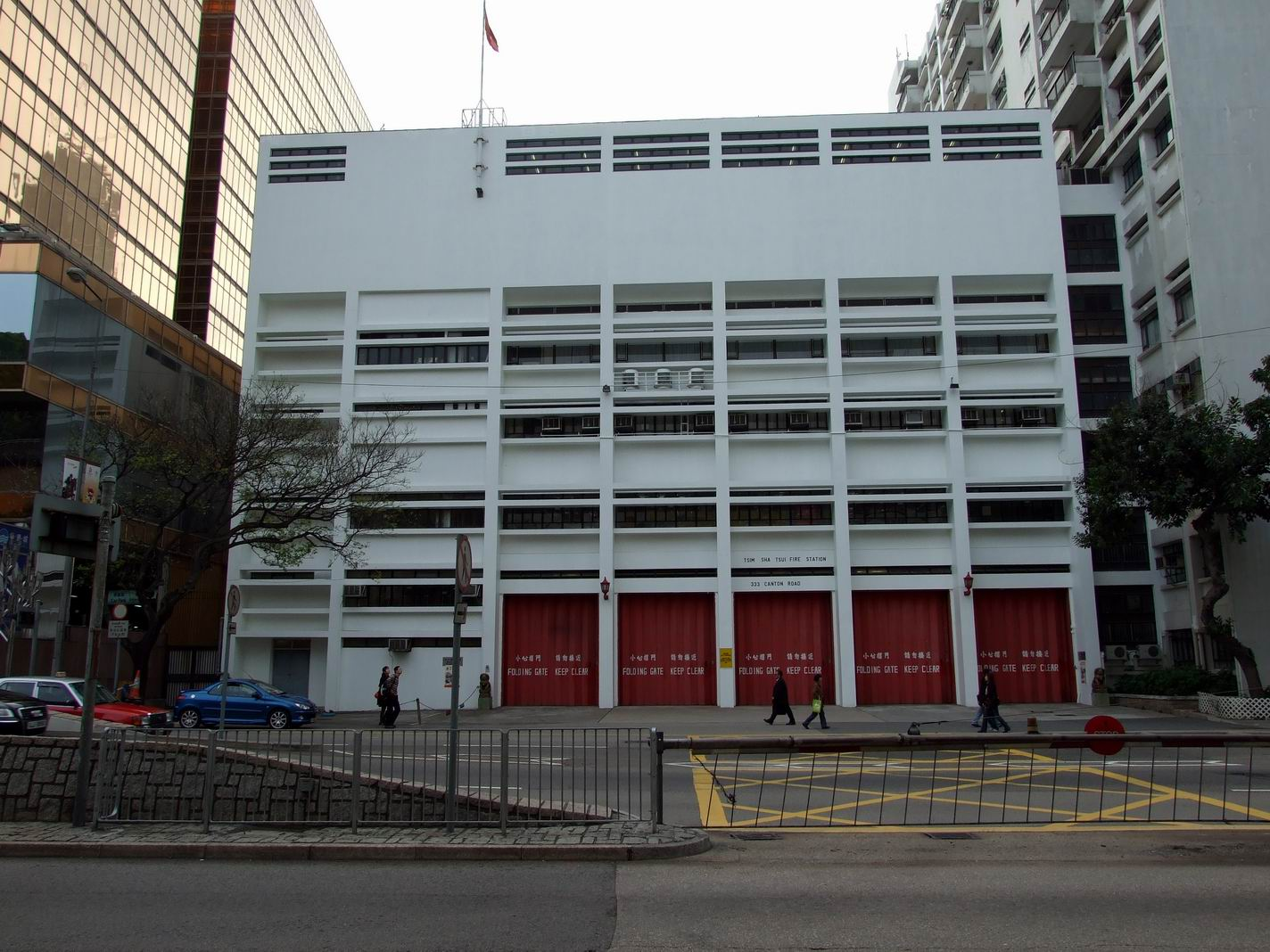 尖沙咀消防局